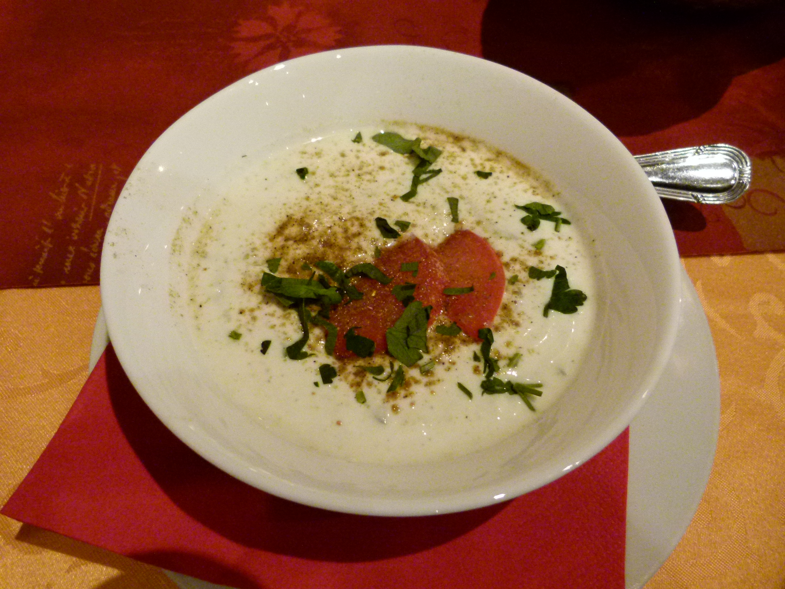 Indischer Joghurt (Dahi), Indisches Restaurant Yogi, Dresden-Laubegast